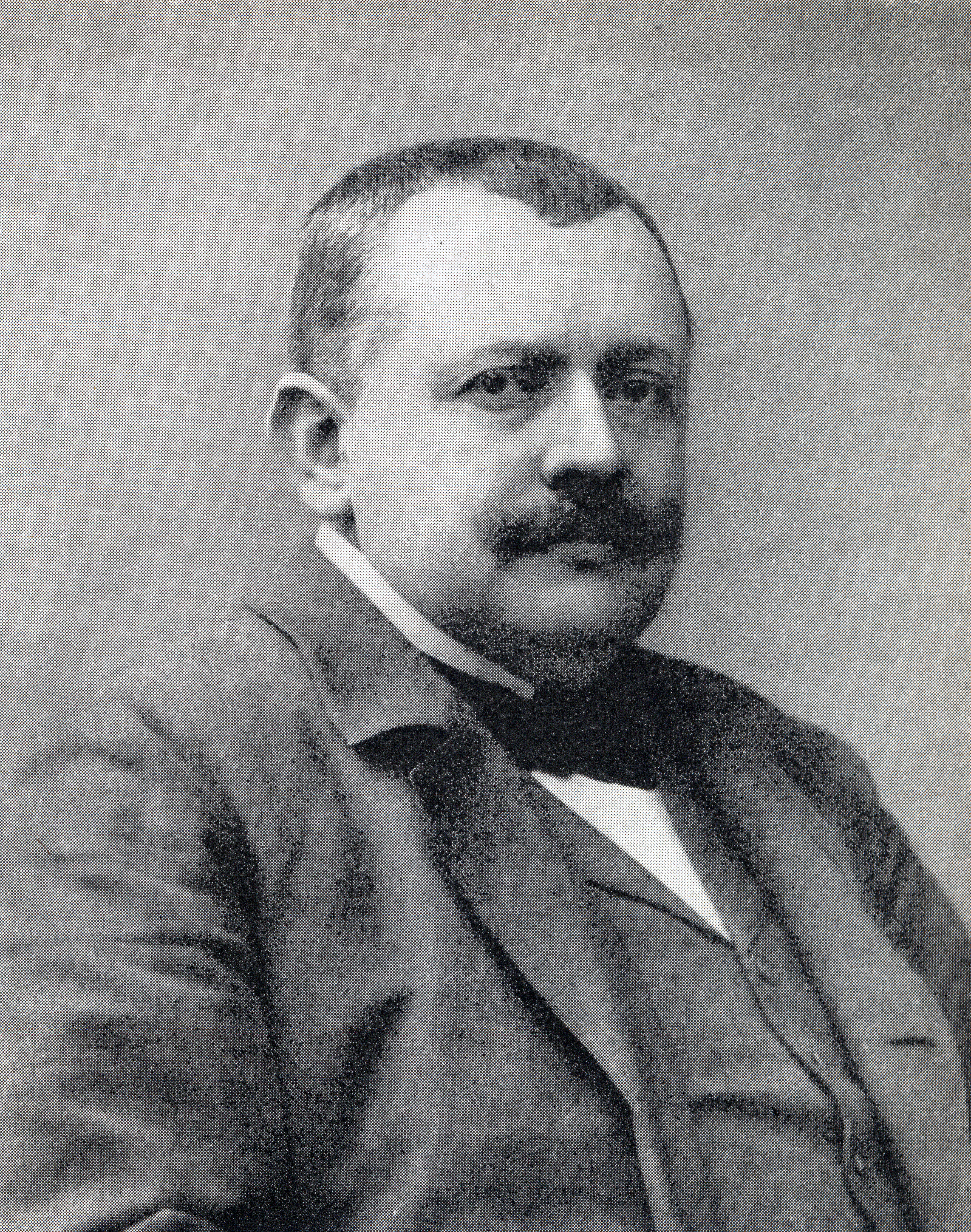 Harald Molander